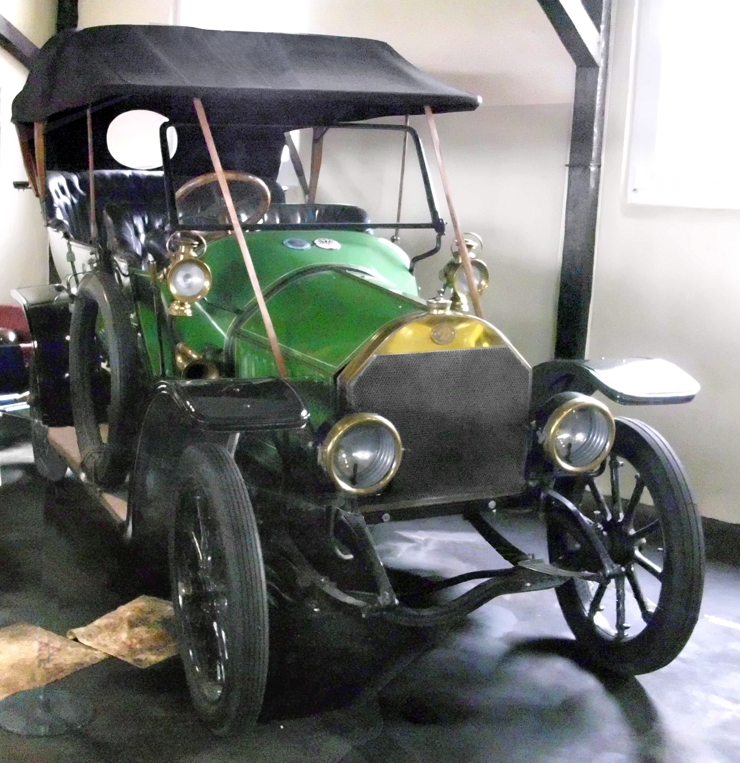 Dürkopp Knipperdolling 10/20 PS 1908